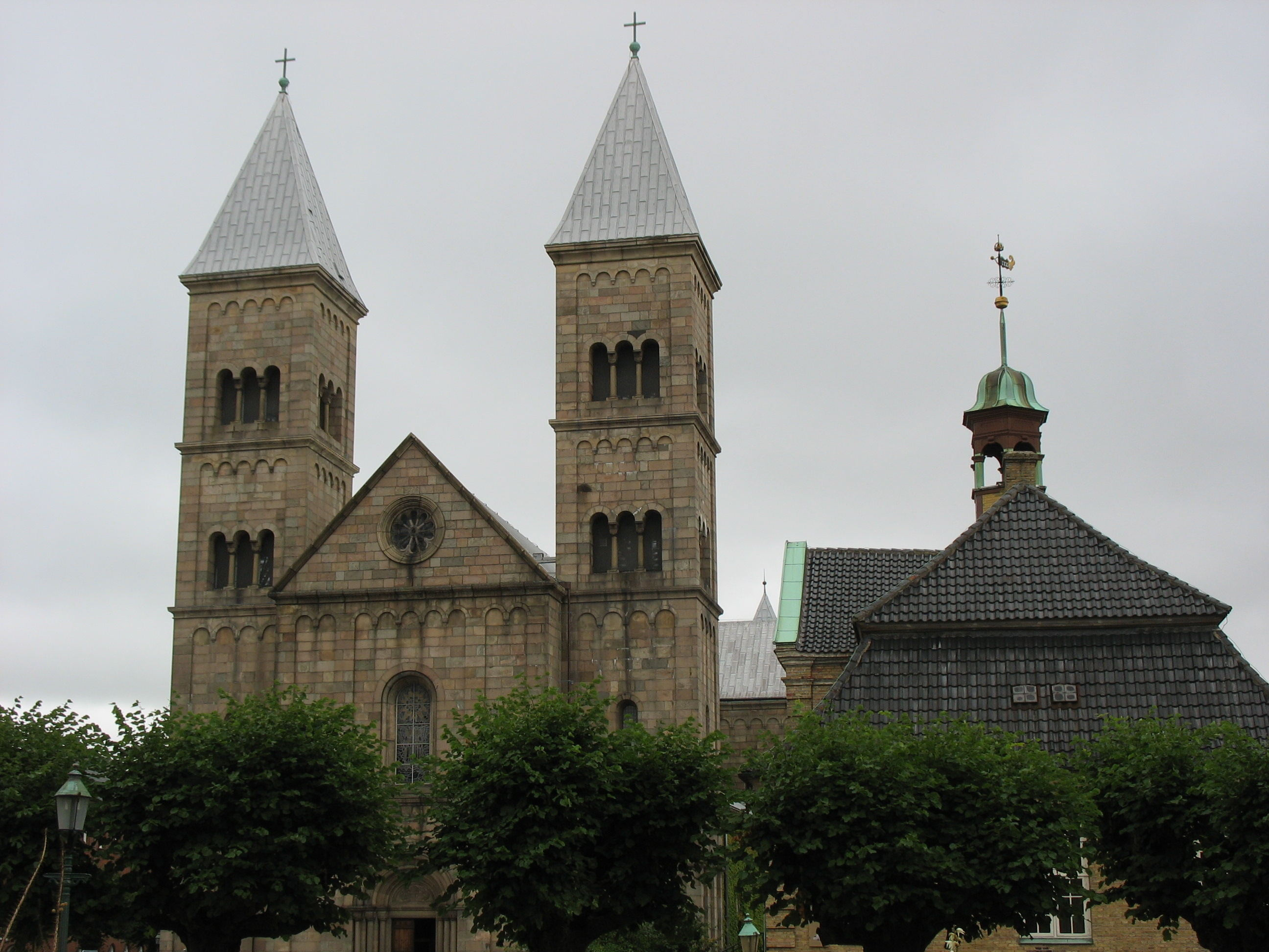 Katedrála ve Viborgu, Dánsko